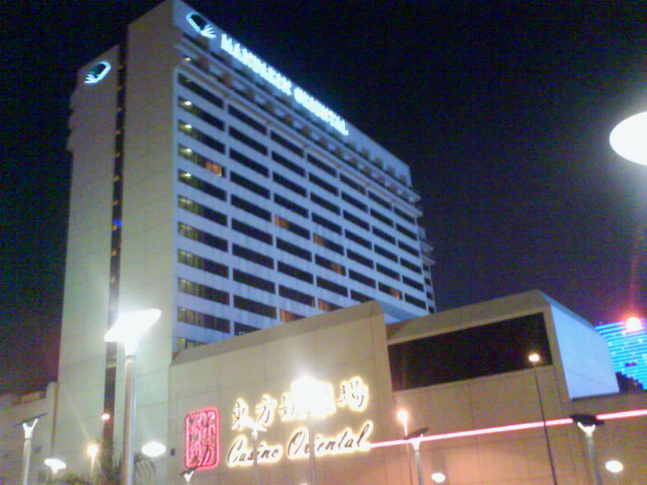 澳門文華東方酒店